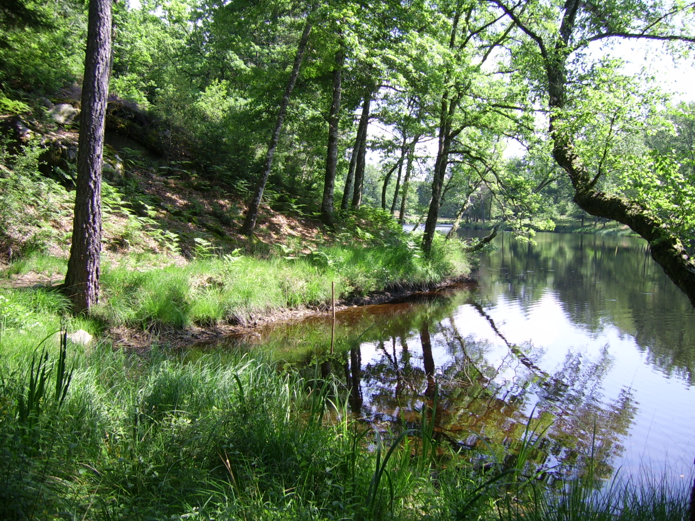 Bord de l'étang du chateau de Sédières, en Corrèze. Image utilisée pour illustrer les articles Limousin et Portail:Limousin.